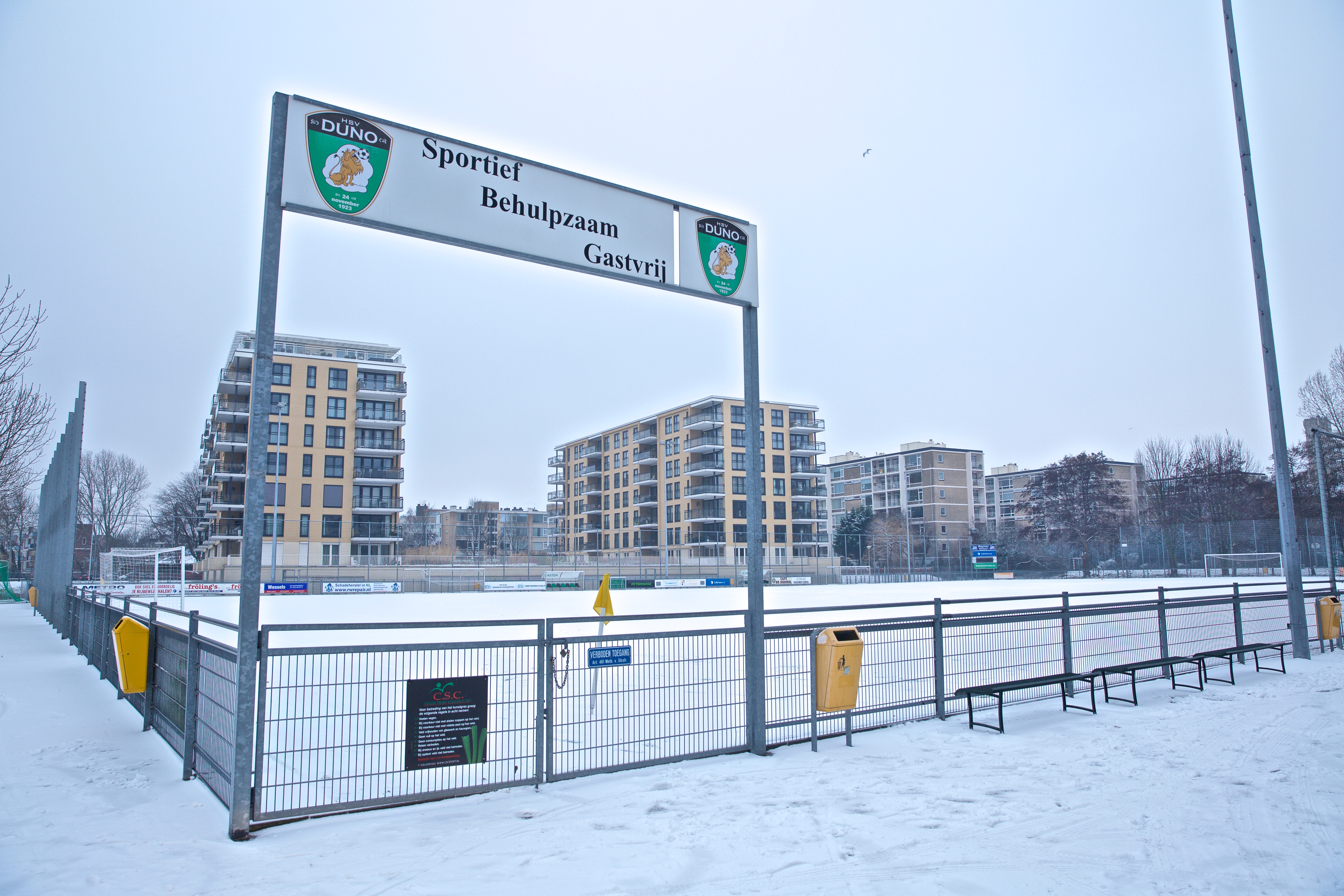 DUNO in de sneeuw, Januari 2019